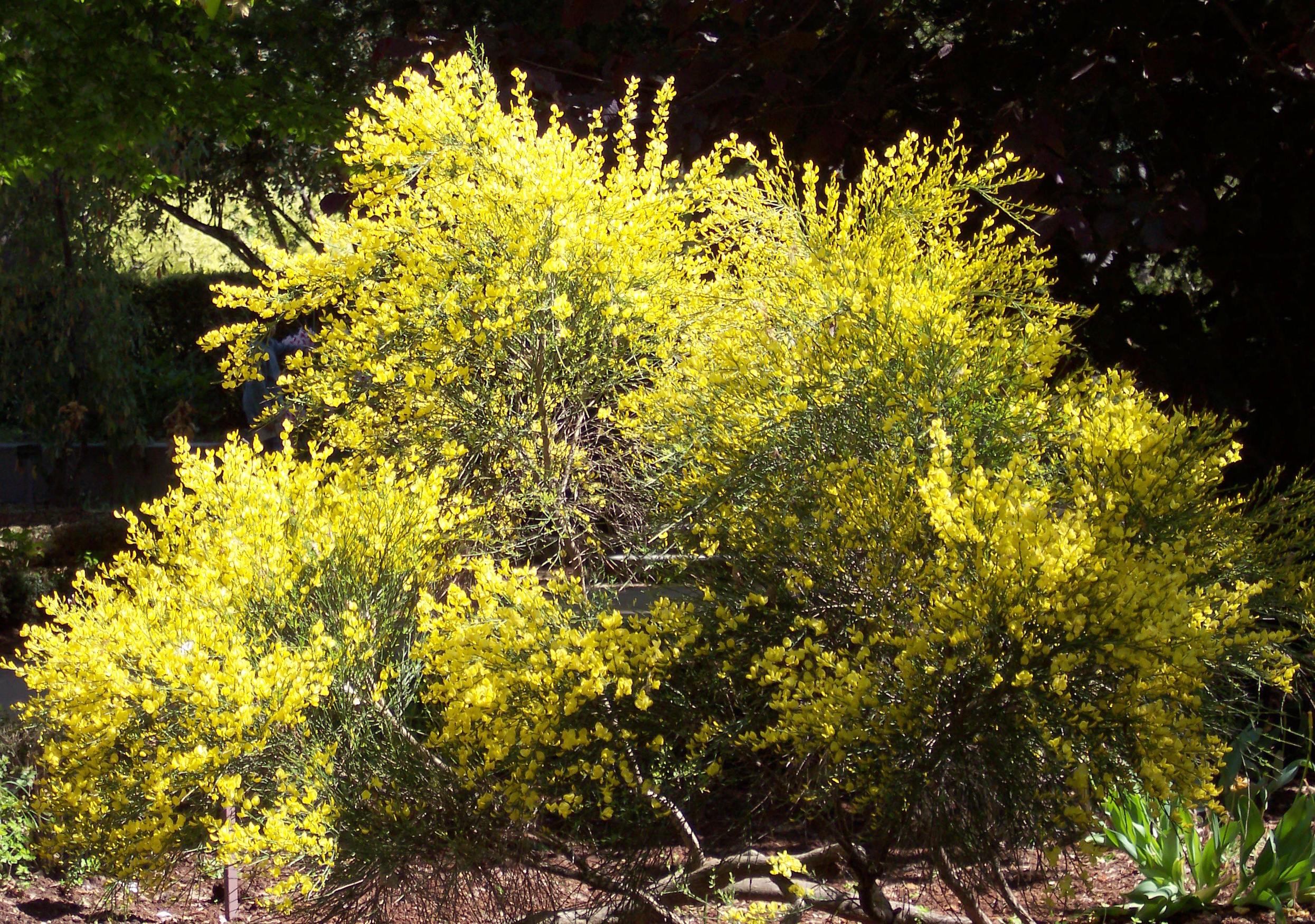 Cytisus × praecox 'All Gold'. Real Jardín Botánico, Madrid